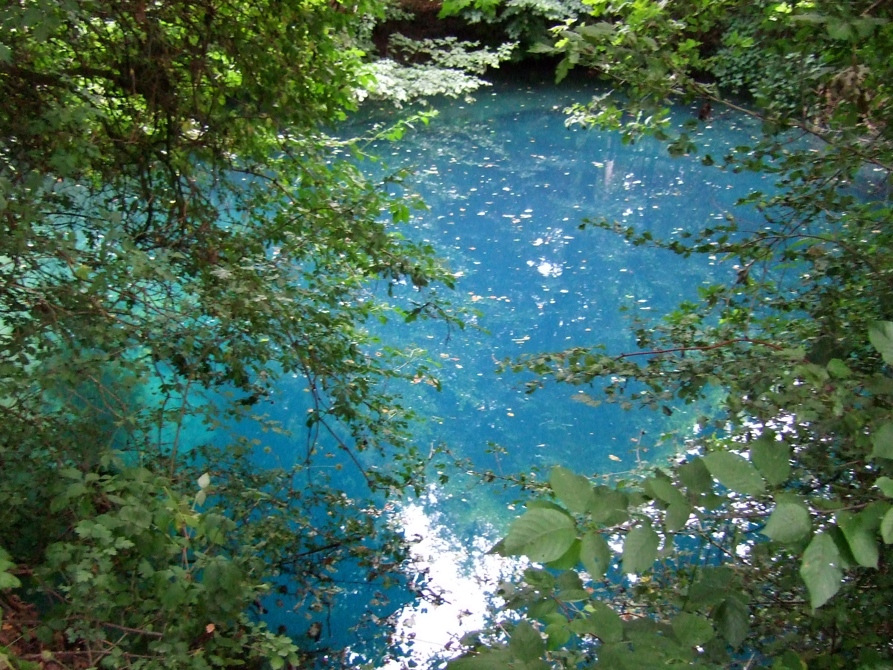 Der Melchiorbrunnen bei Oberdorla (Nähe Mühlhausen/Thüringen). Er und andere Karstquellen (im Muschelkalk) werden durch Wasser aus dem ausgedehnt bewaldeten Hainich (Nordwesten Thüringens) gespeist.